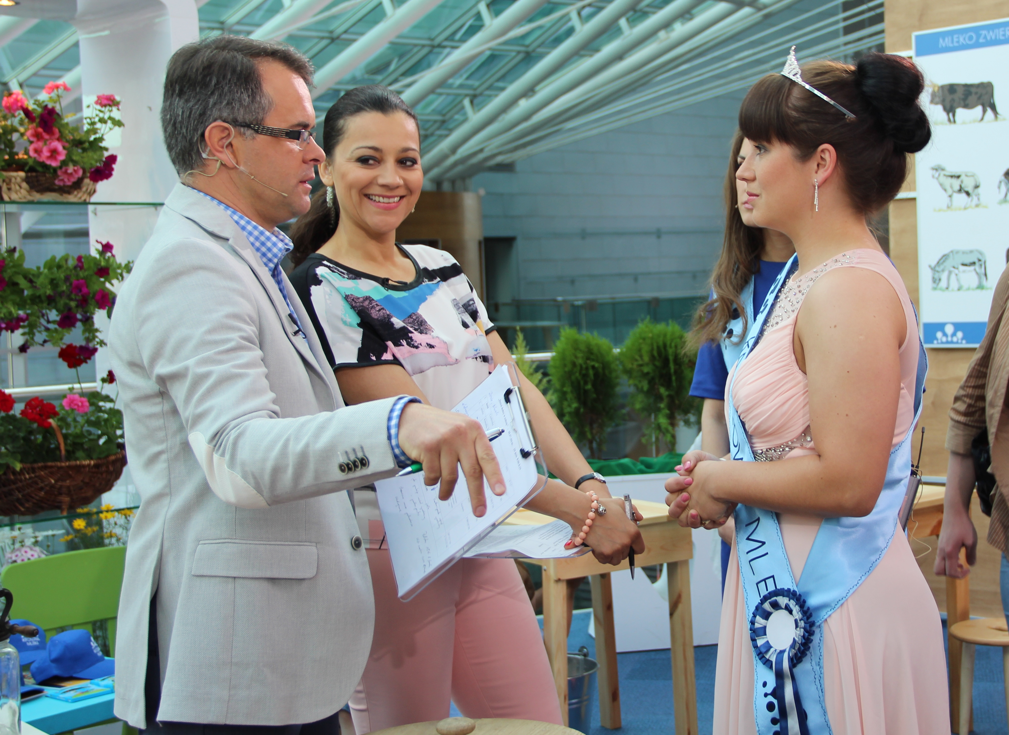 TVP 1, Dzień dobry w sobotę, 05.07.2014, Fernsehsendung mit Królowa Mleka, Katarzyna Gajownik.